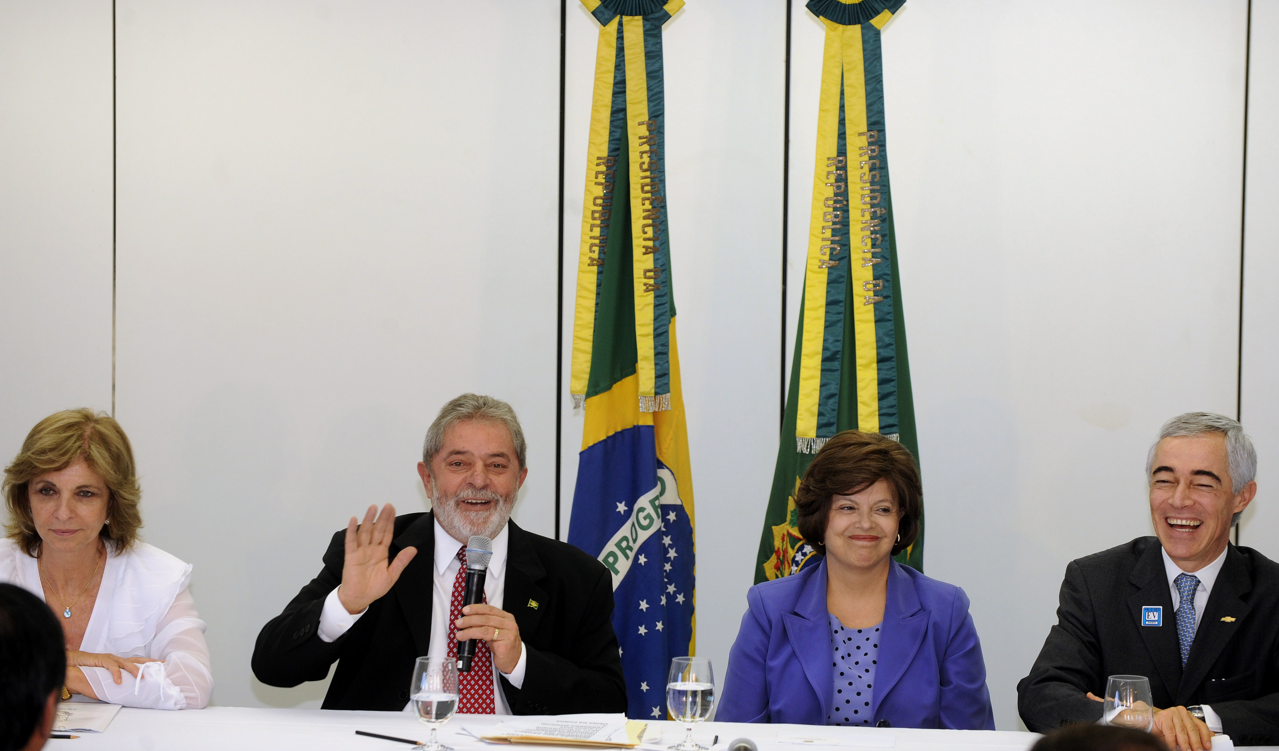 A governadora do Rio Grande do Sul, Yeda Crusius, o presidente Luiz Inácio Lula da Silva, a ministra Dilma Rosseff, e o presidente da General Motors do Brasil e Mercosul, Jaime Ardila, na cerimônia em que foram anunciados novos investimentos da empresa no país.